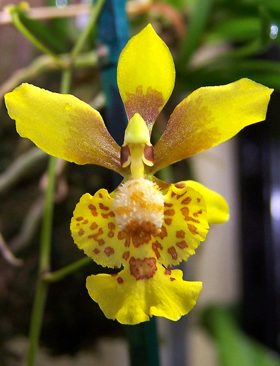 Grandiphyllum divaricatum